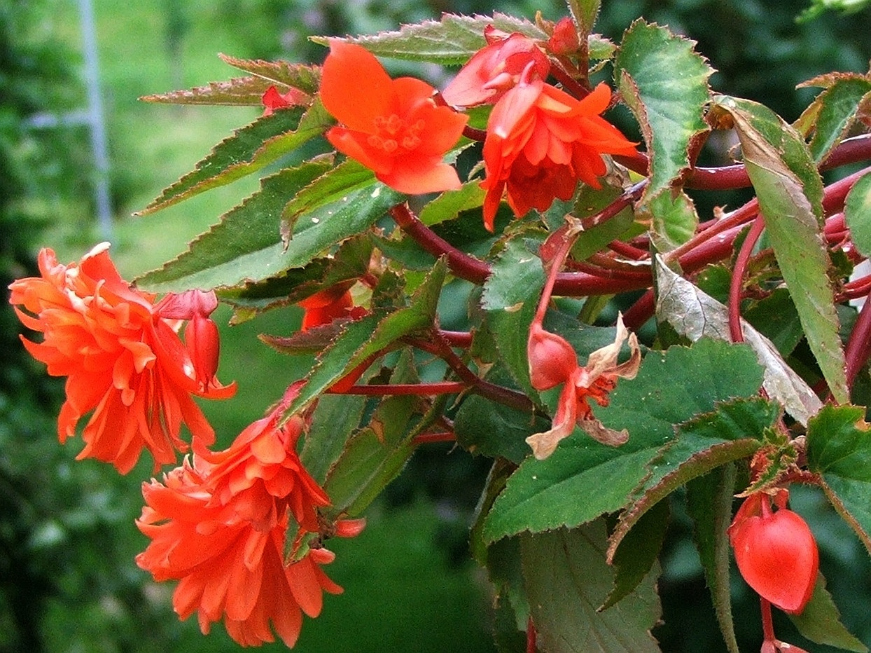 Begonia × tuberhybrida (pl. begonia bulwiasta zwisająca)